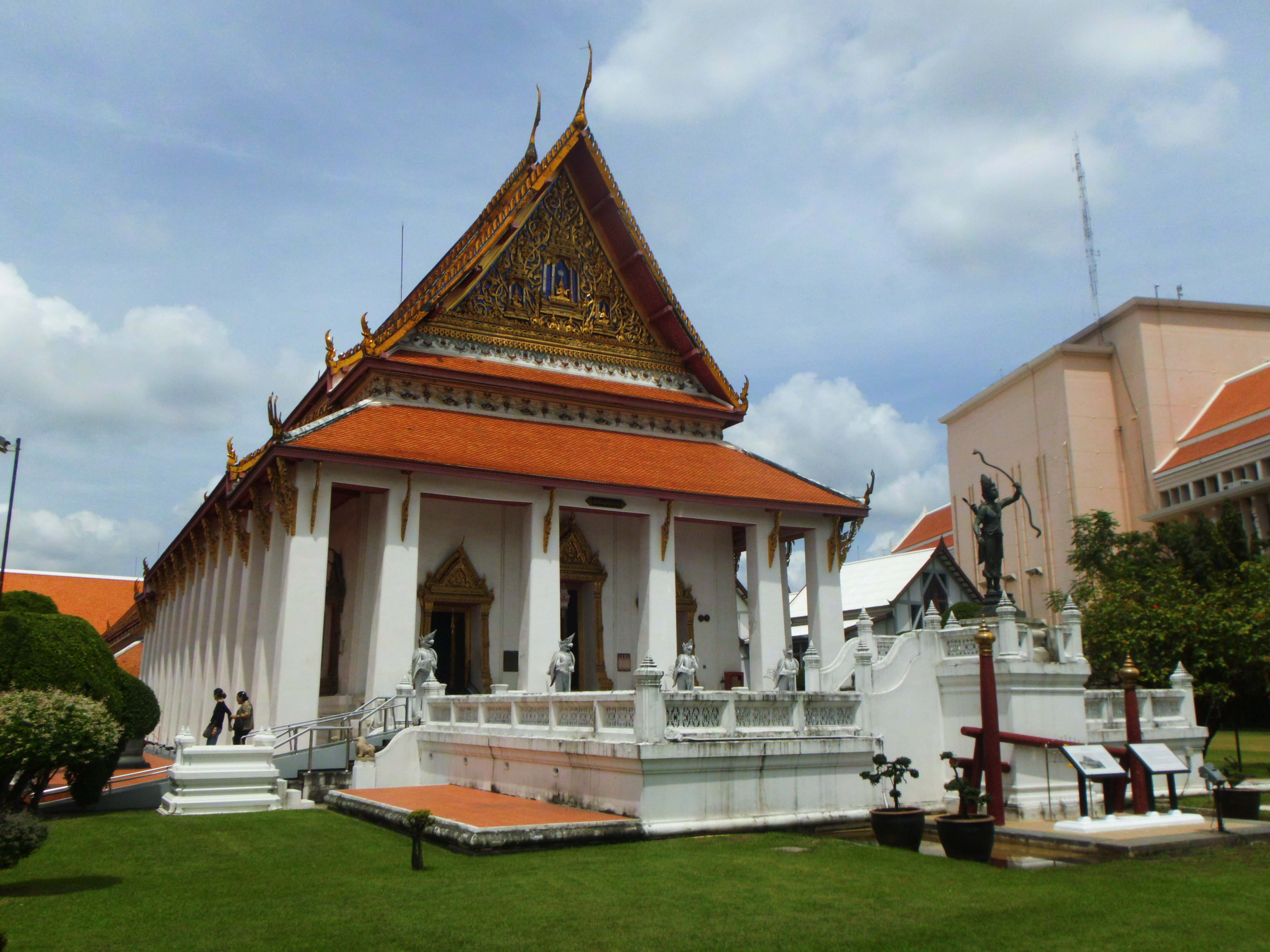 พระราชวังบวรสถานมงคลและกำแพงพระราชวังบวรสถานมงคล(วังหน้า)